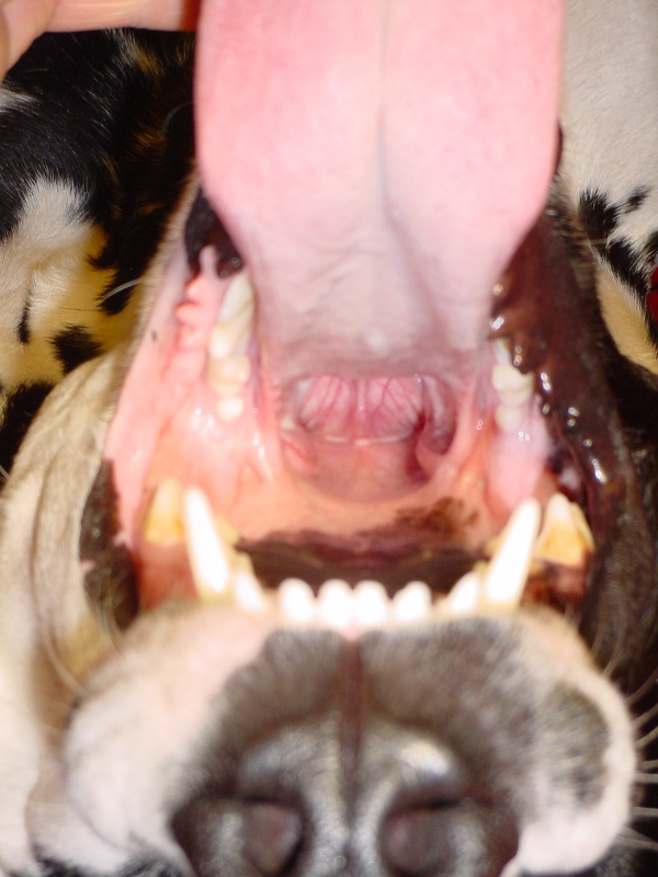 Blick auf den Kehldeckel, Hund